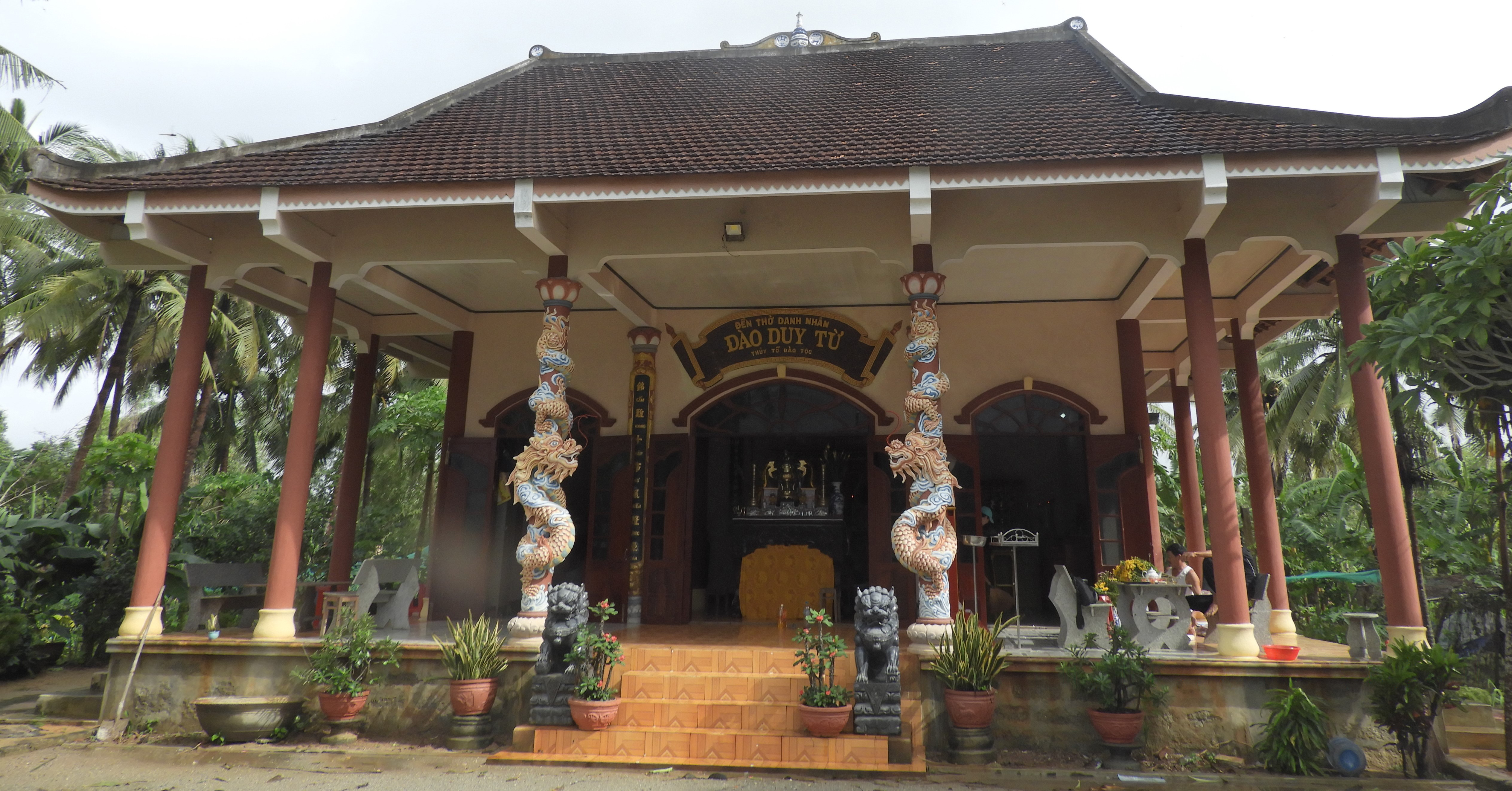 Đền thờ Đào Duy Từ tại thôn Cự Tài, xã Hoài Phú, huyện Hoài Nhơn, tỉnh Bình Định do Chúa Sãi Nguyễn Phúc Nguyên sai lập năm 1634.